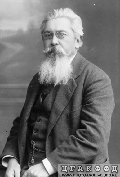 Депутат Четвертой Государственной думы от Донского войска Иван Николаевич Ефремов.